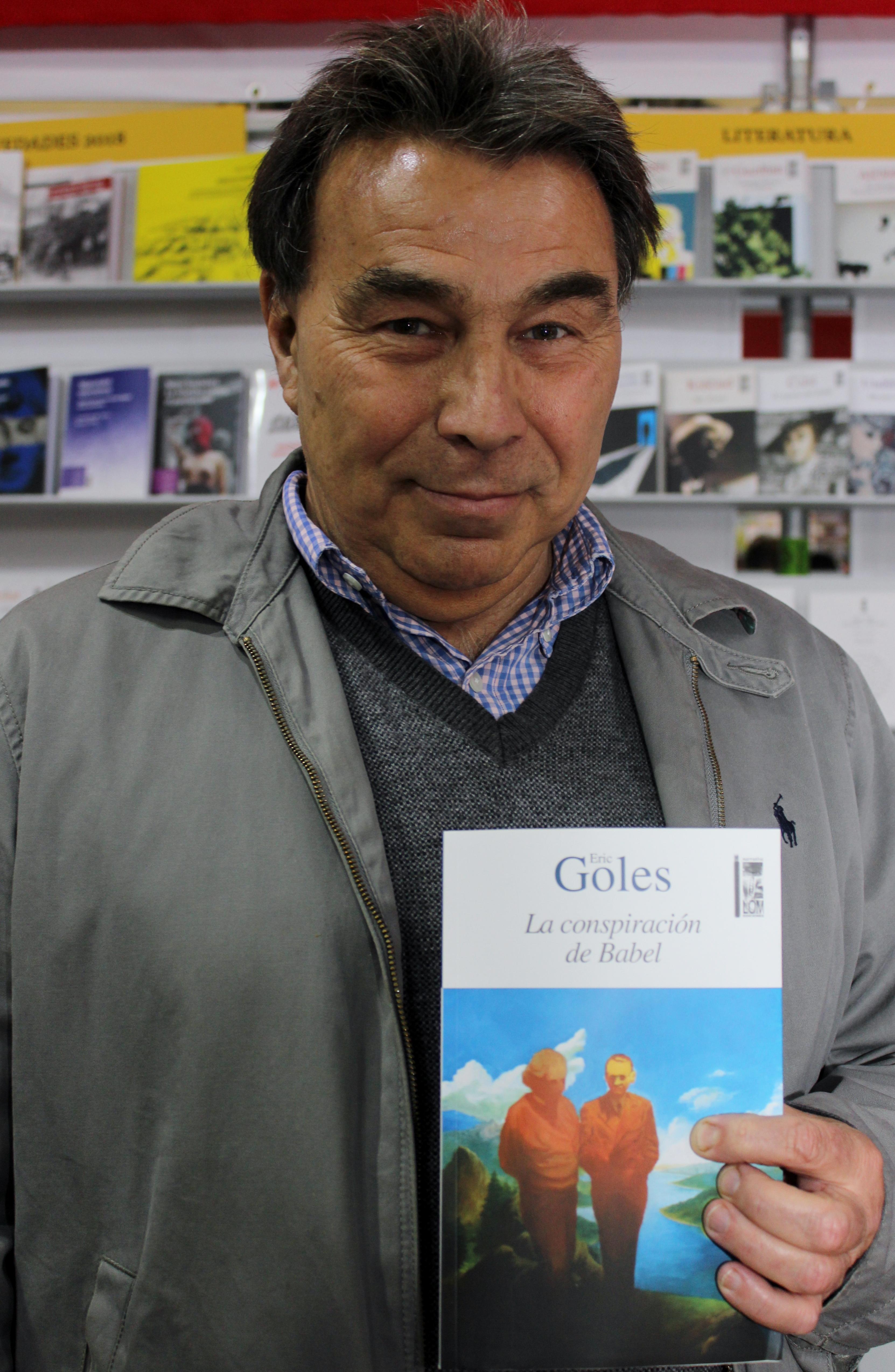 El científico y escritor Eric Goles con su libro La conspiración de Babel en el stand de LOM durante la Feria Internacional del Libro de Santiago 2018.